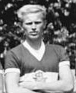 Title: Mannschaftsfoto FC Hansa Rostock Factual corrections and alternative descriptions are encouraged separately from the original description. Additionally errors can be reported at this page to inform the Bundesarchiv. Original historic description: Zentralbild-Sindermann-29.7.70-ma-Rostock: Fußball-Oberligamannschaft des FC Hansa Rostock. Stehend v.l.: Gerd Kirsche (18 Jahre), Herbert Pankau (28), Dieter Lenz (21), Helmut Schühler (27), Joachim Streich (19), Klaus-Peter Stein (23) und Lothar Hahn (22). 1. Reihe v.l.: Christian Radtke (20), Jürgen Decker (24), Gerd Sackritz (27), Torwart Jürgen Heinsch (30), Manfred Rump (29), Klaus-Dieter Seehaus (27), Helmut Hergesell (28) und Axel Bergmann (20).